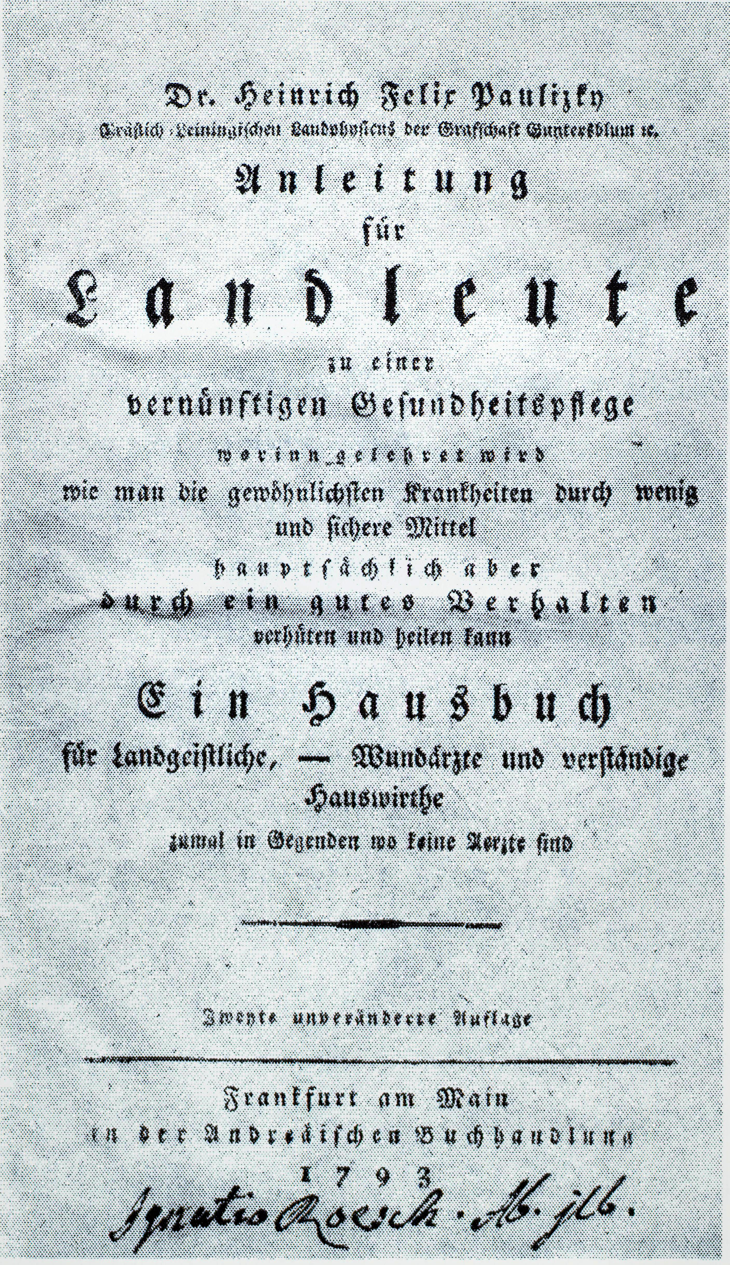 Buchumschlag des Buches Anleitungen für Landleute zu einer vernünftigen Gesundheitspflege von Heinrich Paulizky, erschienen 1791